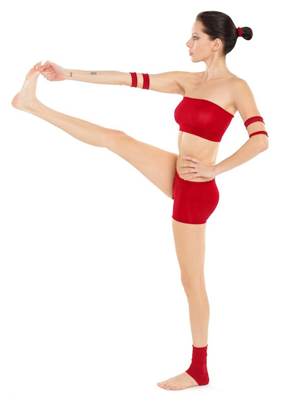 Utthita Hasta Padangusthasana by Nina Mel, Yoga Teacher